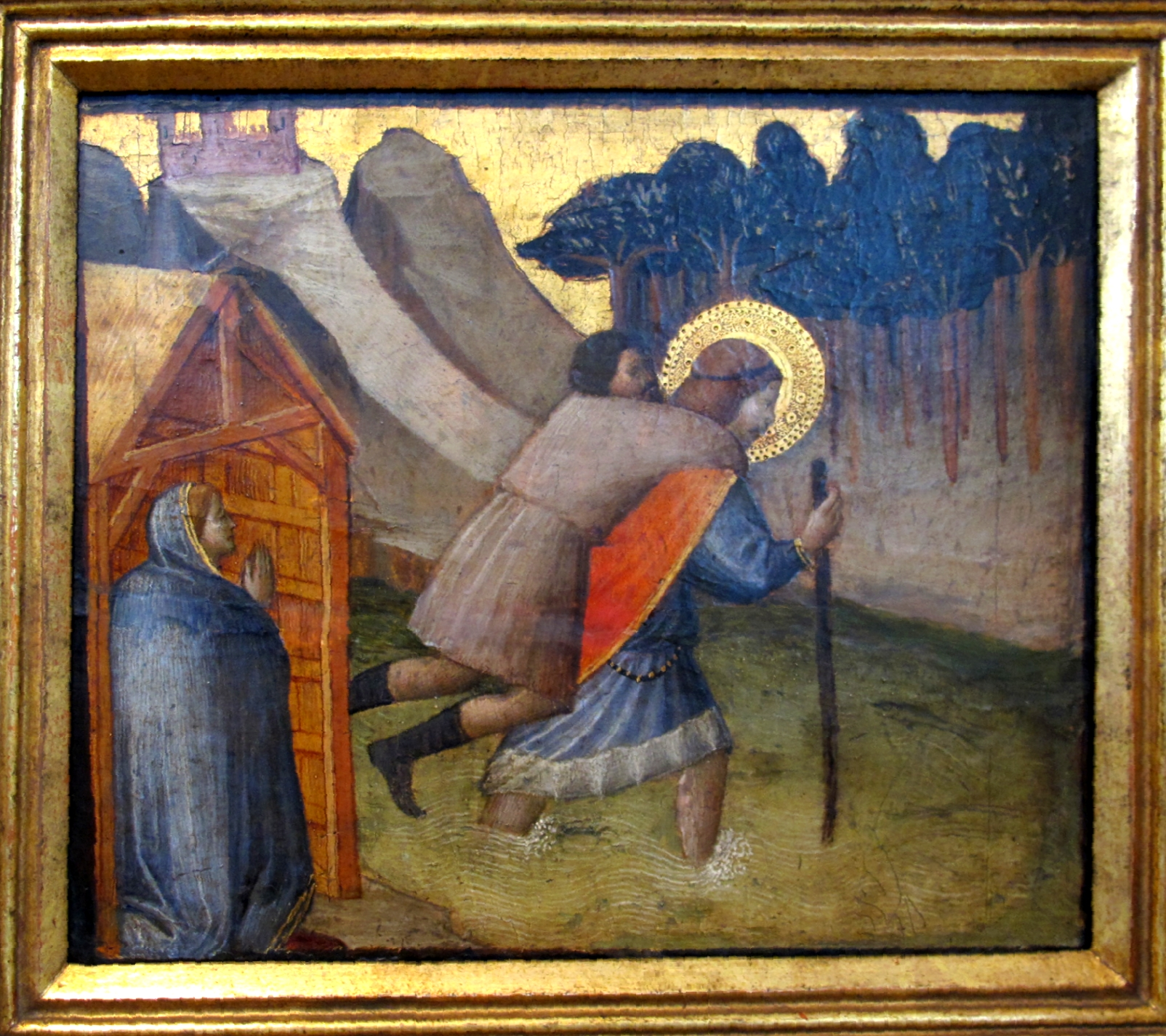 Storie di san giuliano